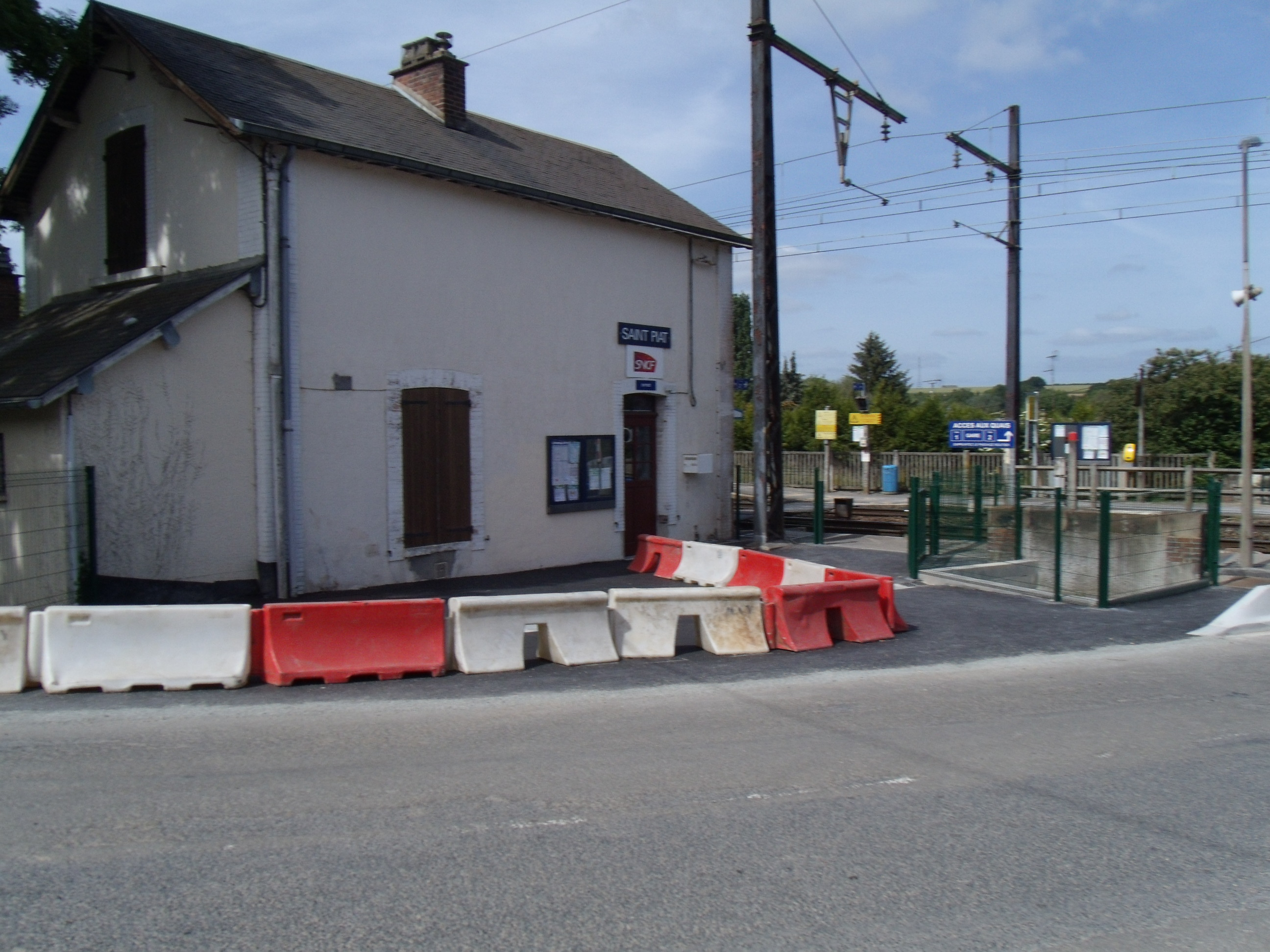 le bâtiment voyageurs de la gare de Saint-Piat